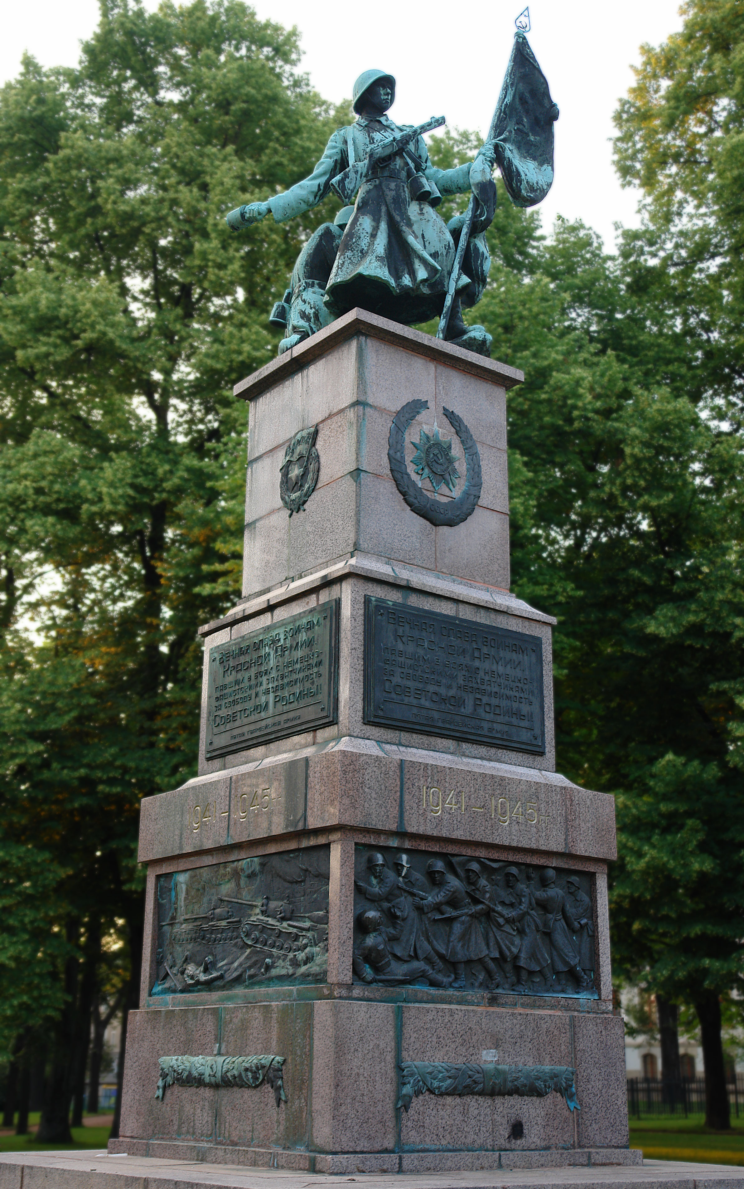 Denkmal der Roten Armee in Dresden